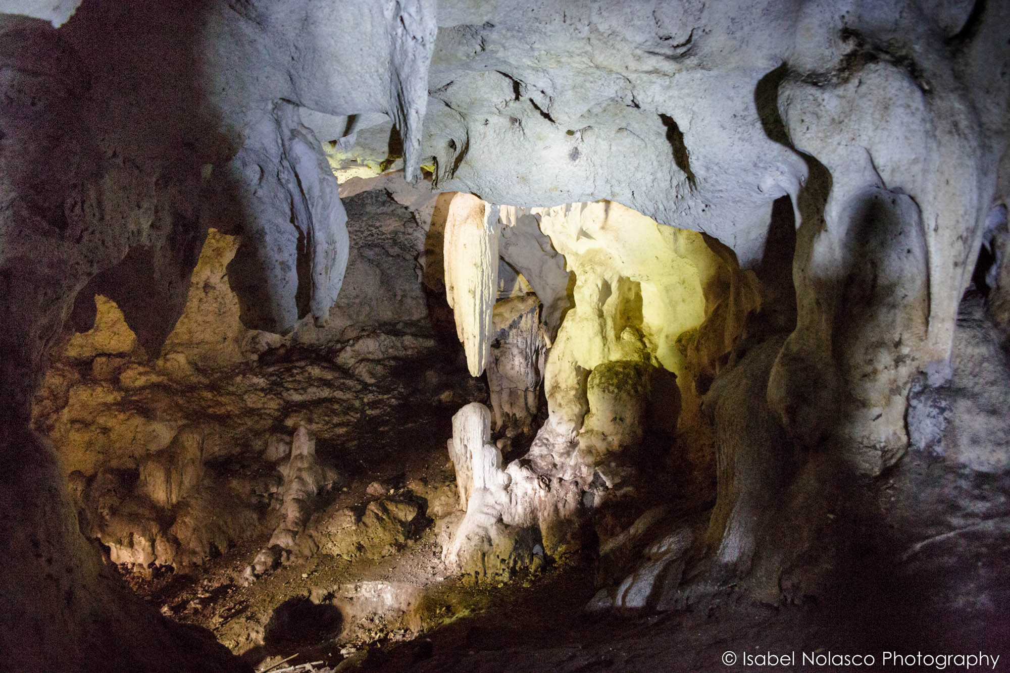 Duanele, die größte Höhle von Balibo, in der Nähe der Stadt Balibo